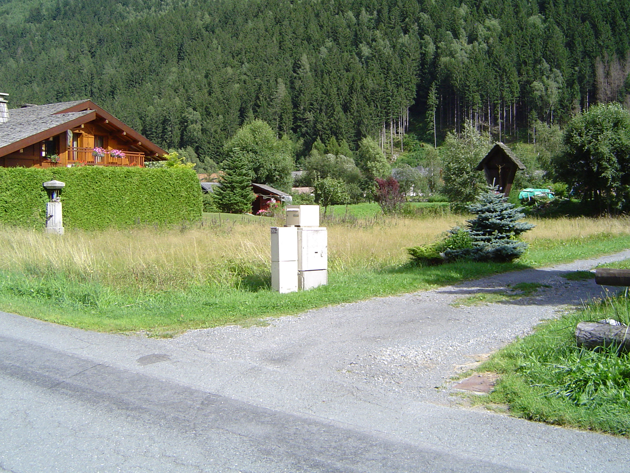 Photos prises dans la commune de Chamonix-Mont-Blanc